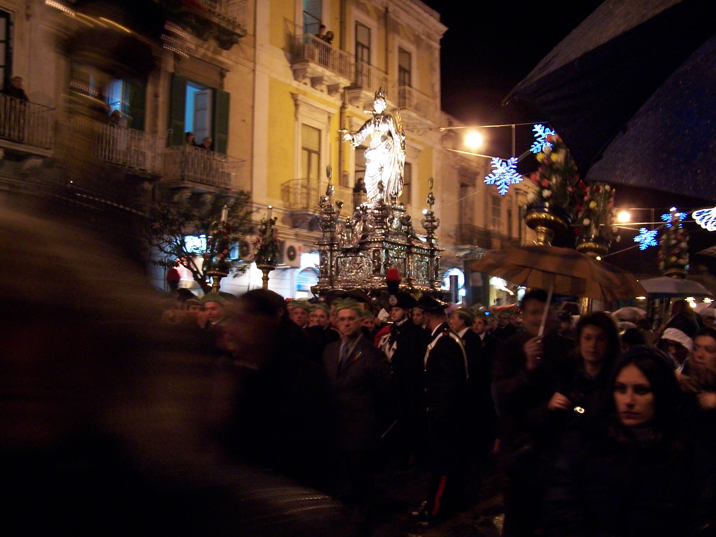 Processione della Festa di santa Lucia a Siracusa.